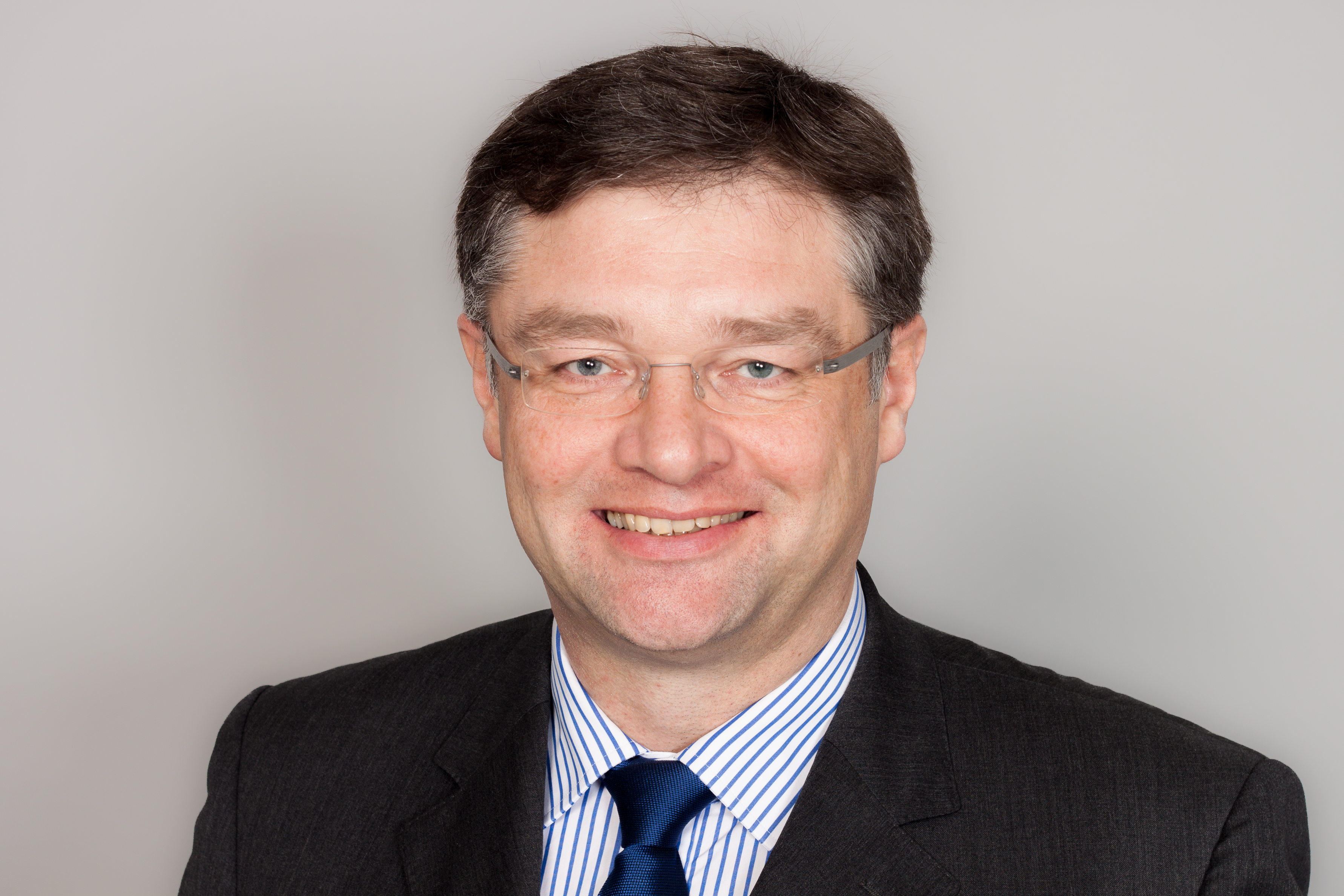 Abgeordneter des Sächsischen Landtages Holger Zastrow